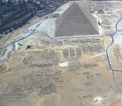 Vue panoramique du cimetière du complexe de Khéops.